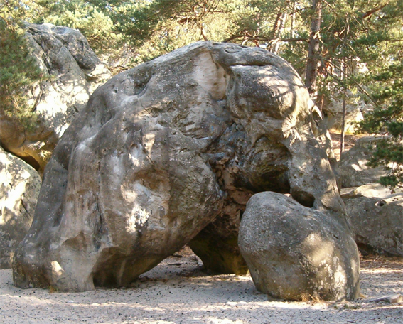 Elephant, Larchant - uitzonderlijk zonder klimmers - Vrij tot gebruik